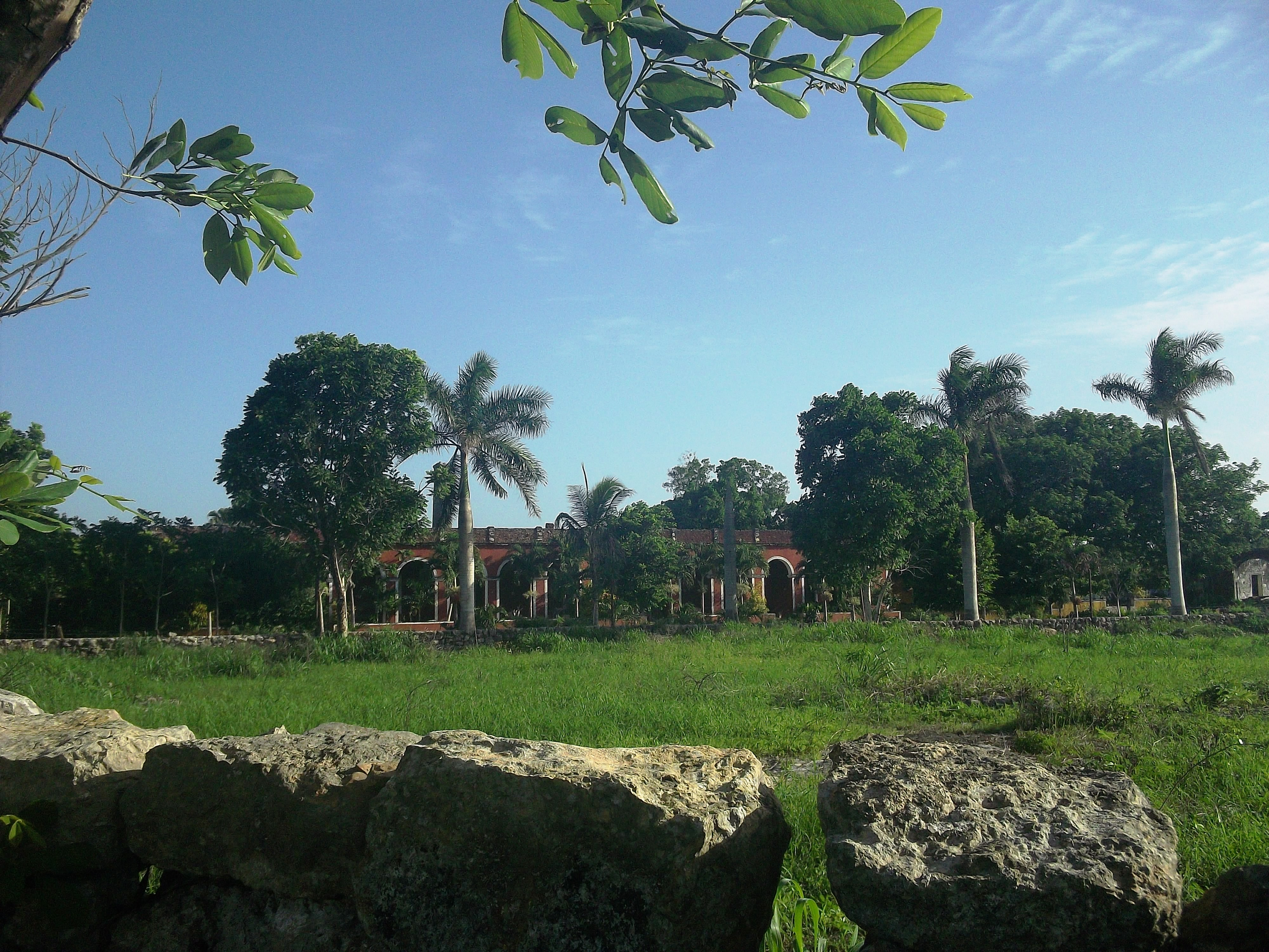 Hacienda de Sanlatah, Yucatán.